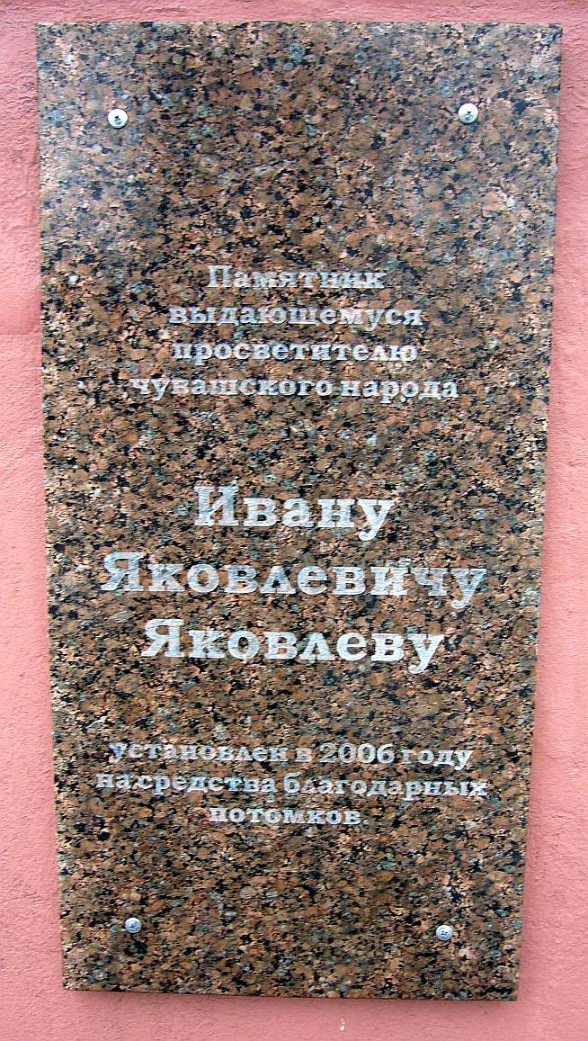 Памятная доска у сквера "Колючий садик"